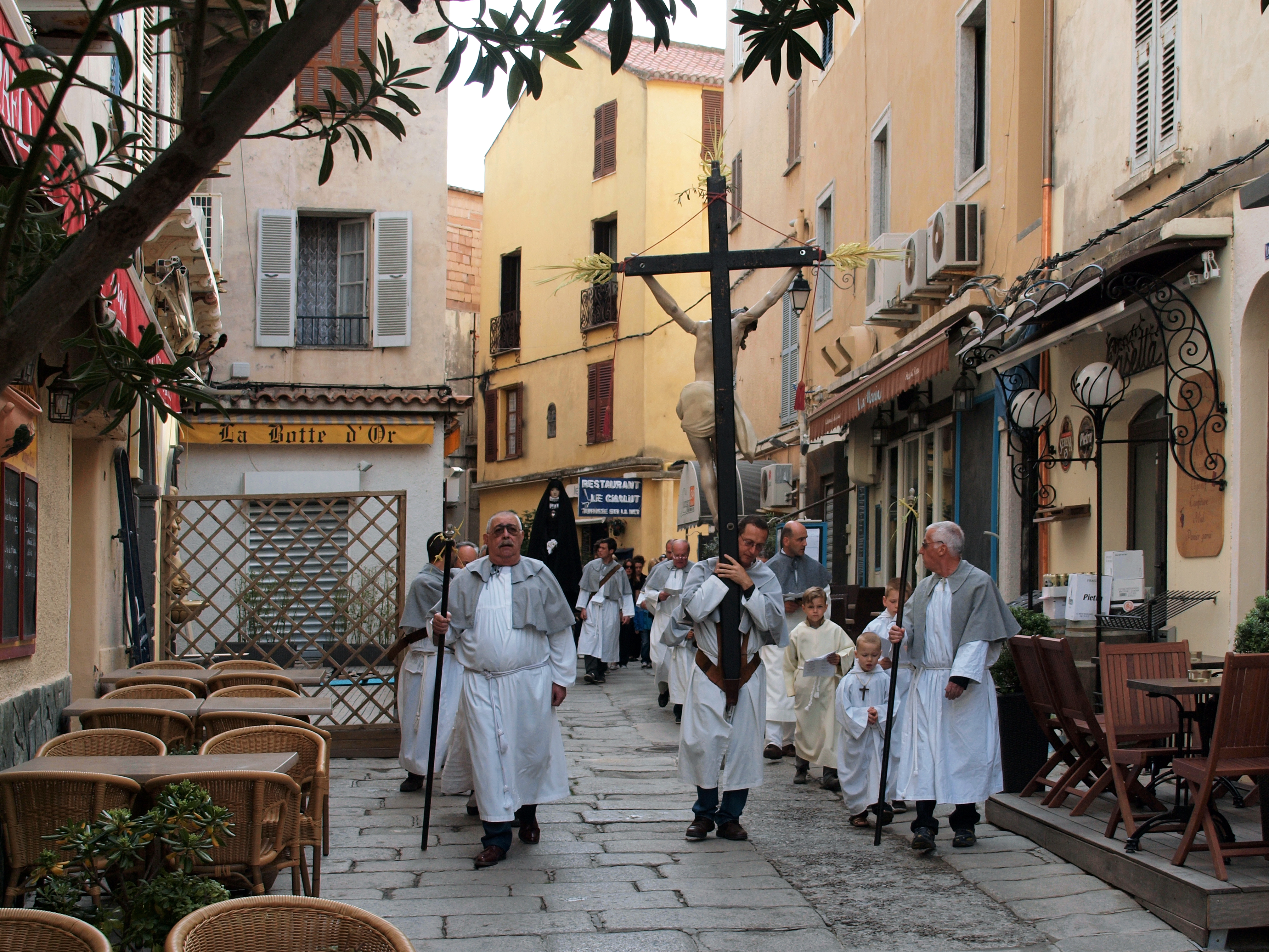 Calvi (Corse) - A Cerca, procession matinale du Vendredi Saint dans la vieille ville. Arrivée des pénitents à l'église Sainte-Marie-Majeure par la rue Clémenceau